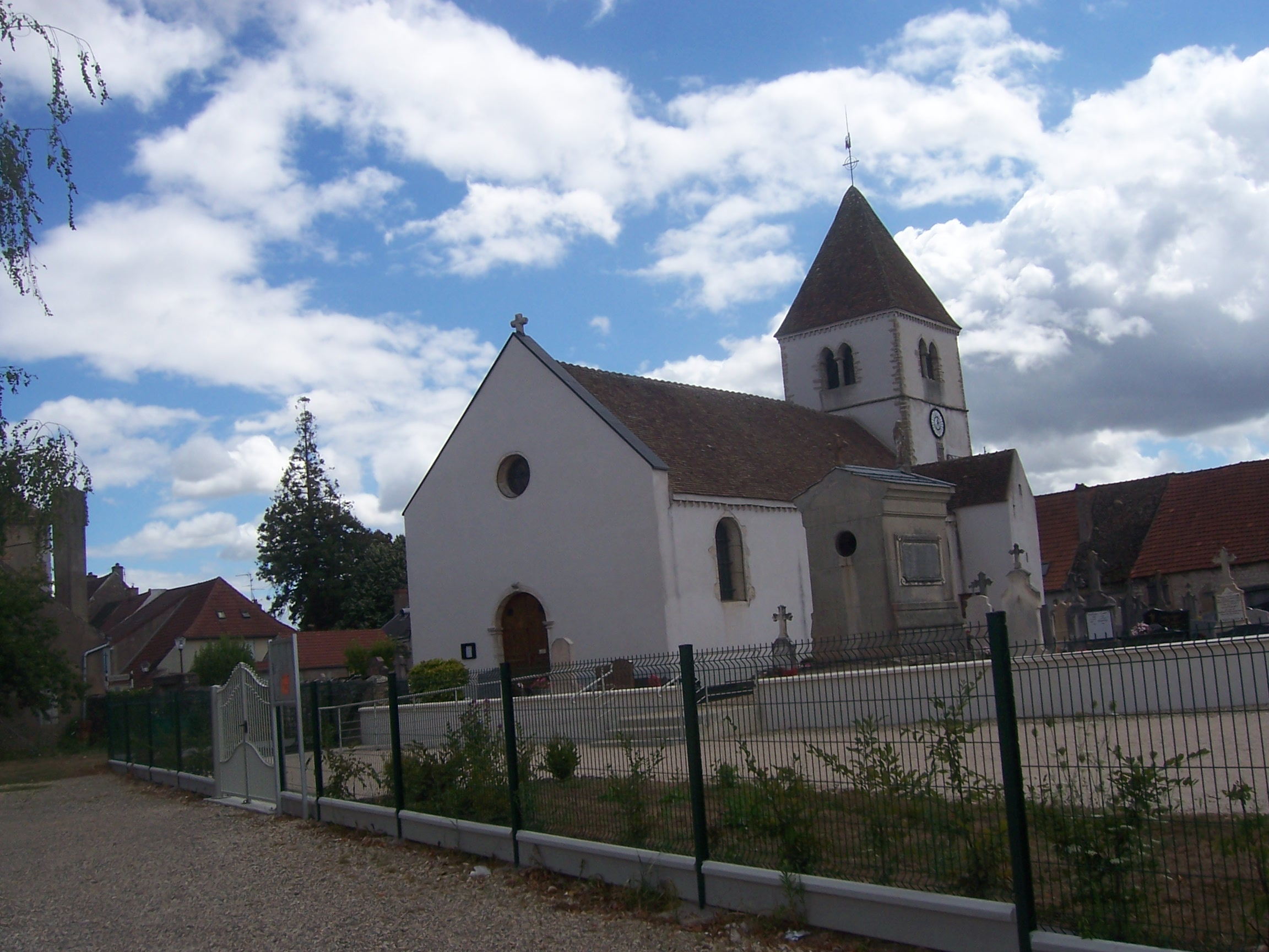 Eglise de Damerey